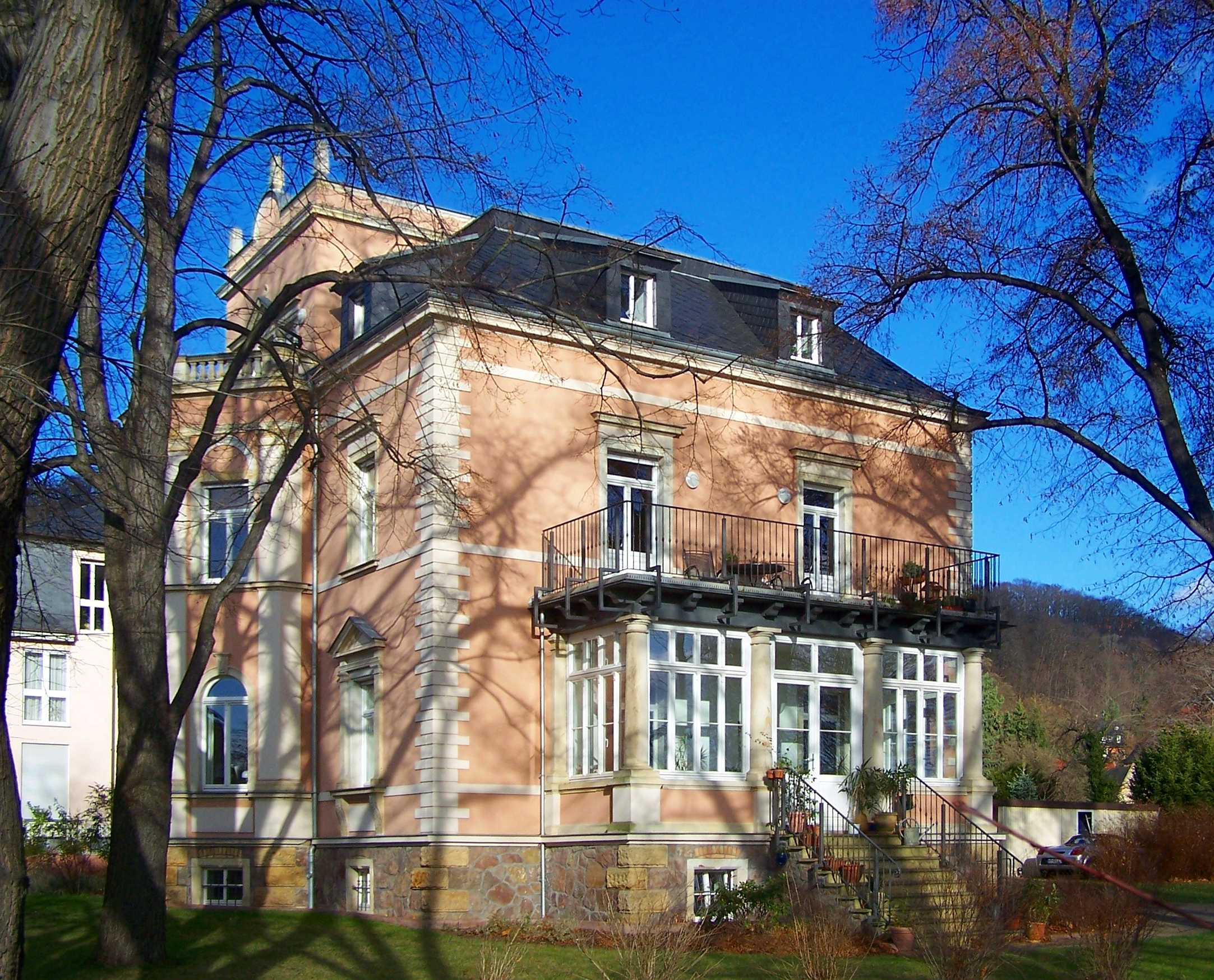 Villa Carl Hugo Haußhälter (Hauptstr. 53) in Radebeul